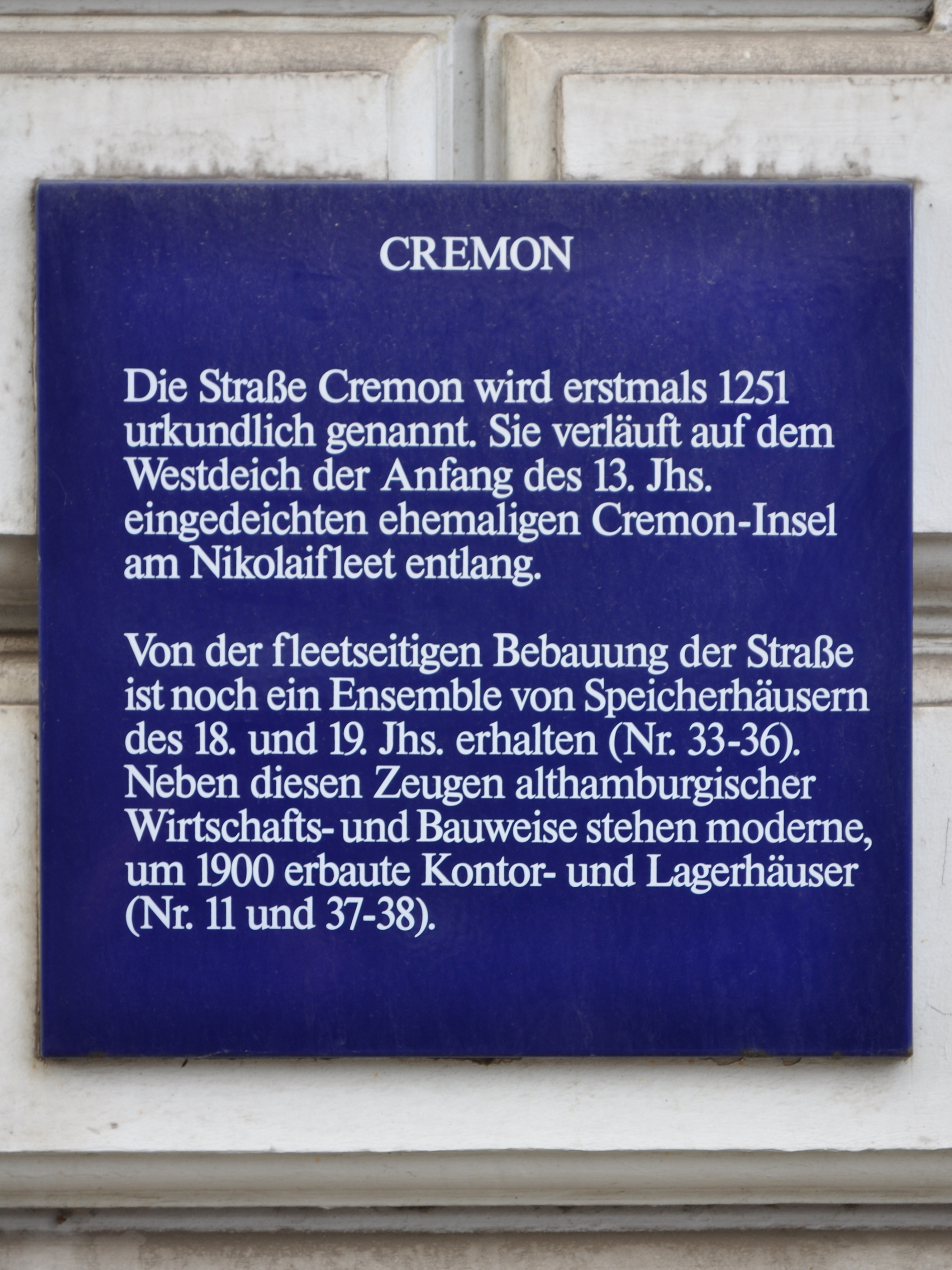 Informationstafel des Hamburger Tafelprogramms in der Straße Cremon.